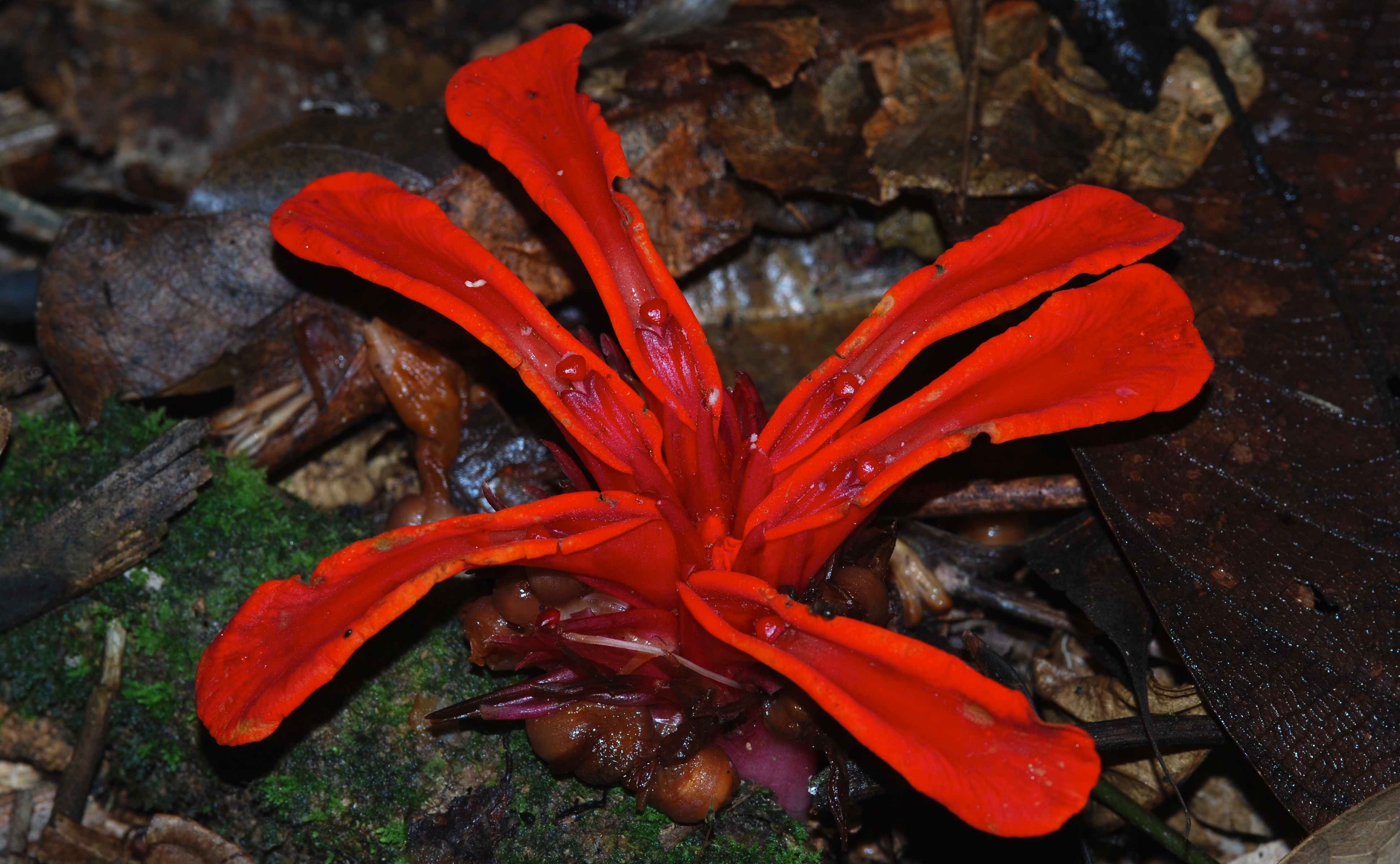 Taman Negara NP, Pahang, MALAYSIA